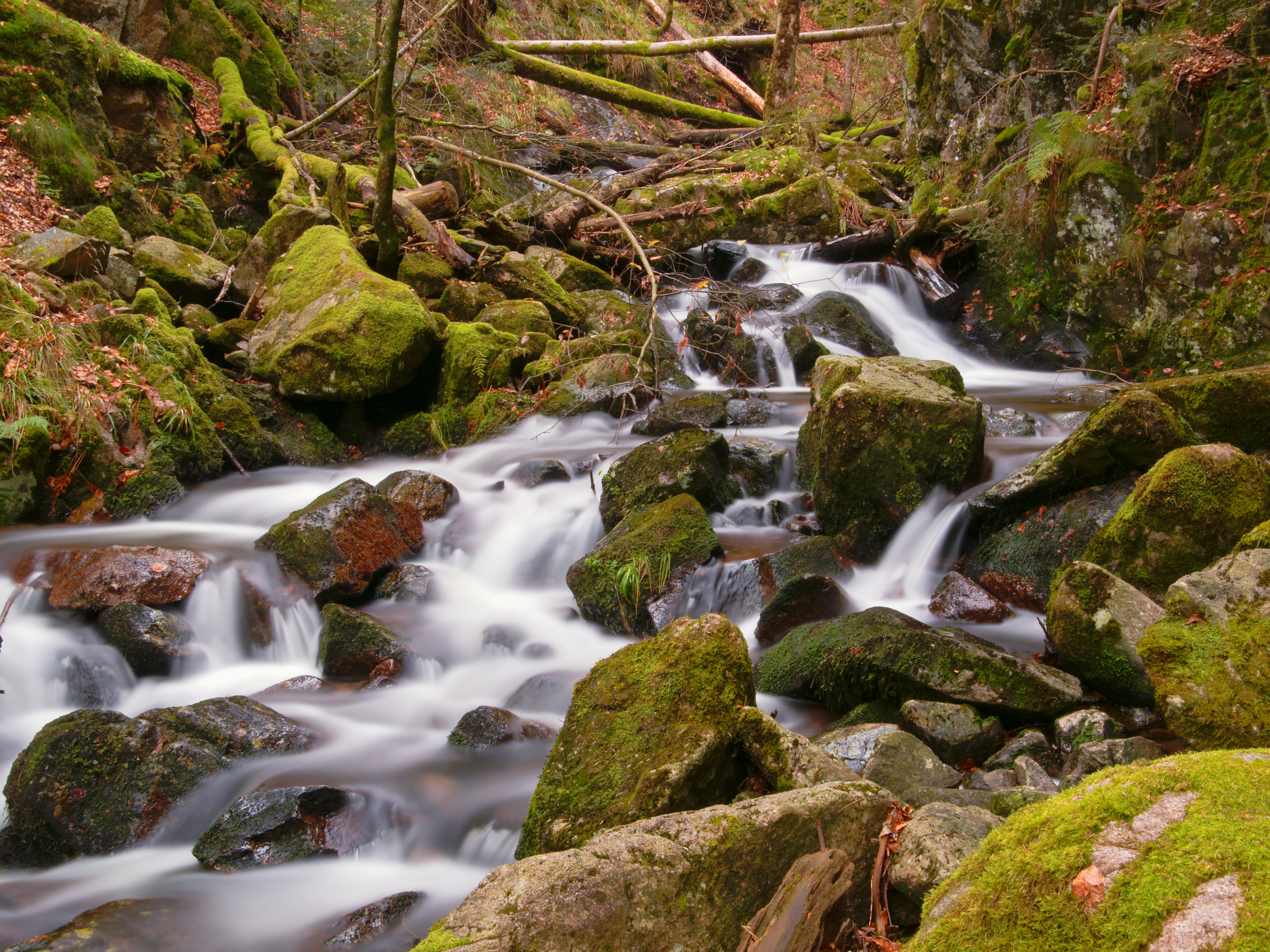 La Savoureuse, à Lepuix. Photo réalisée avec un filtre ND16.